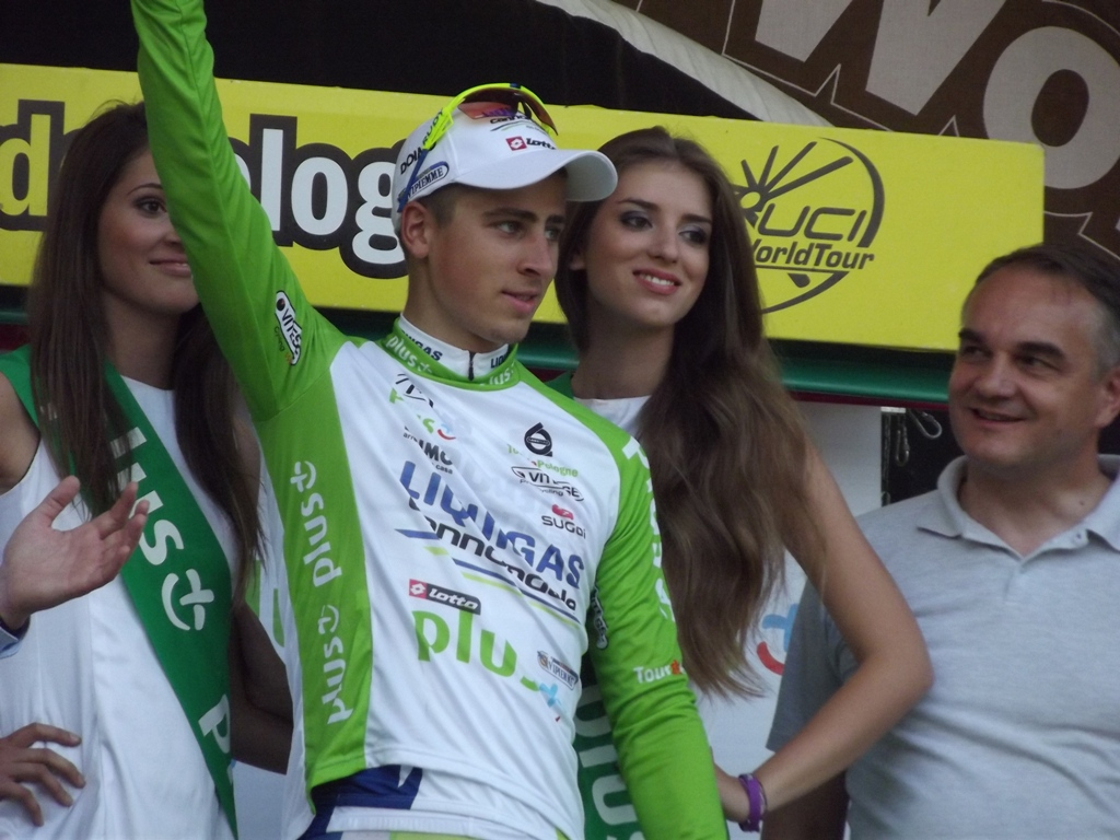 Zdjęcie zrobione podczas ostatniego etapu 68. Tour de Pologne w Krakowie.